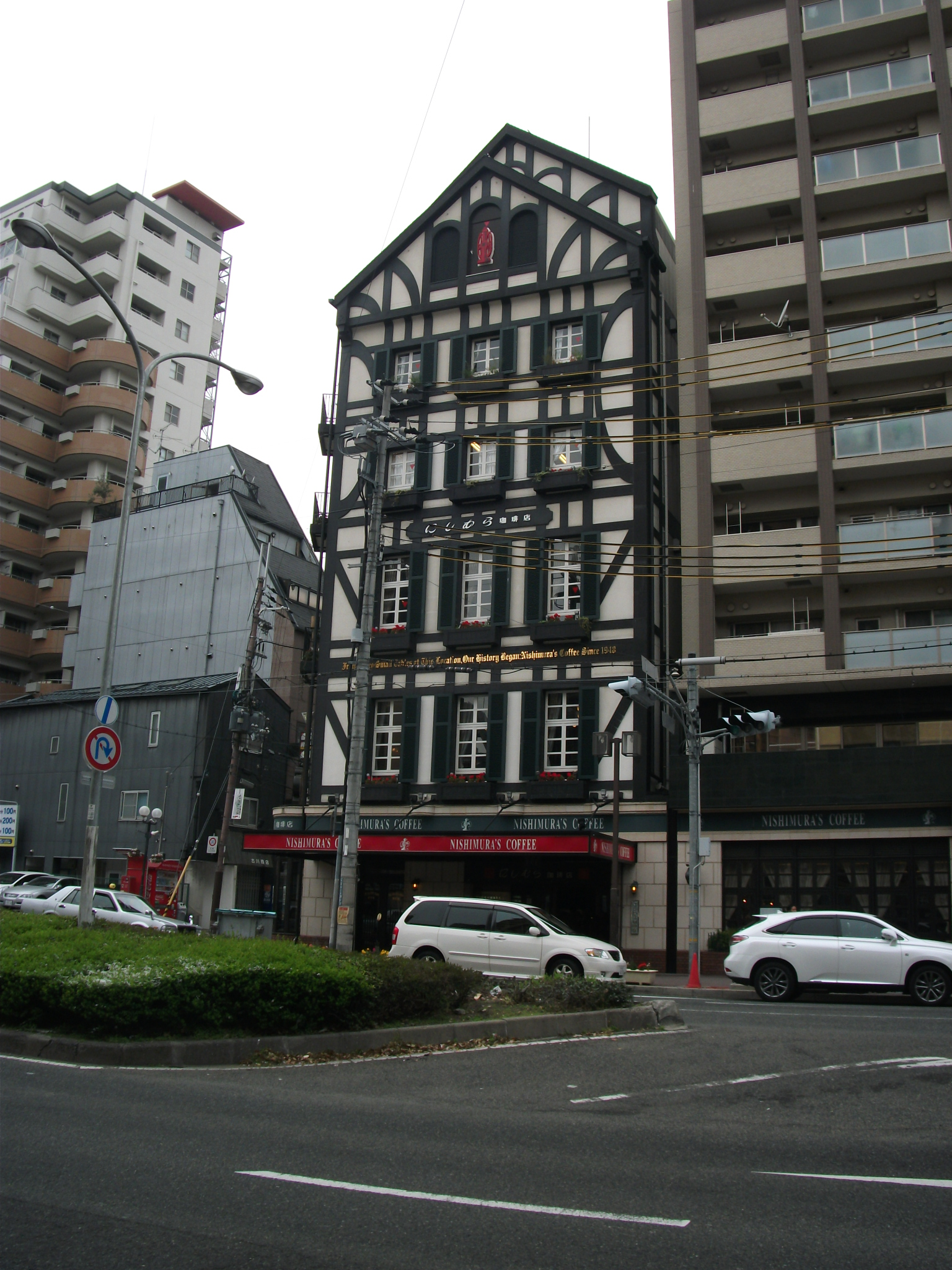 神戸市中央区、神戸にしむら珈琲店中山手本店